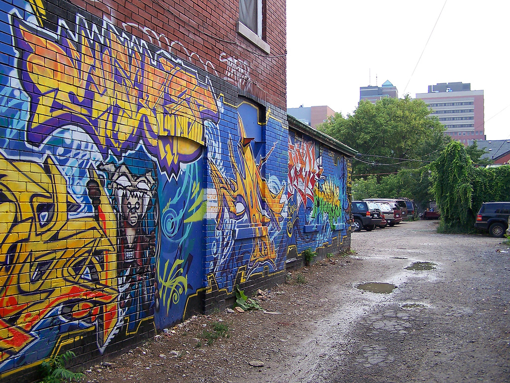 Um beco tipico daqui...